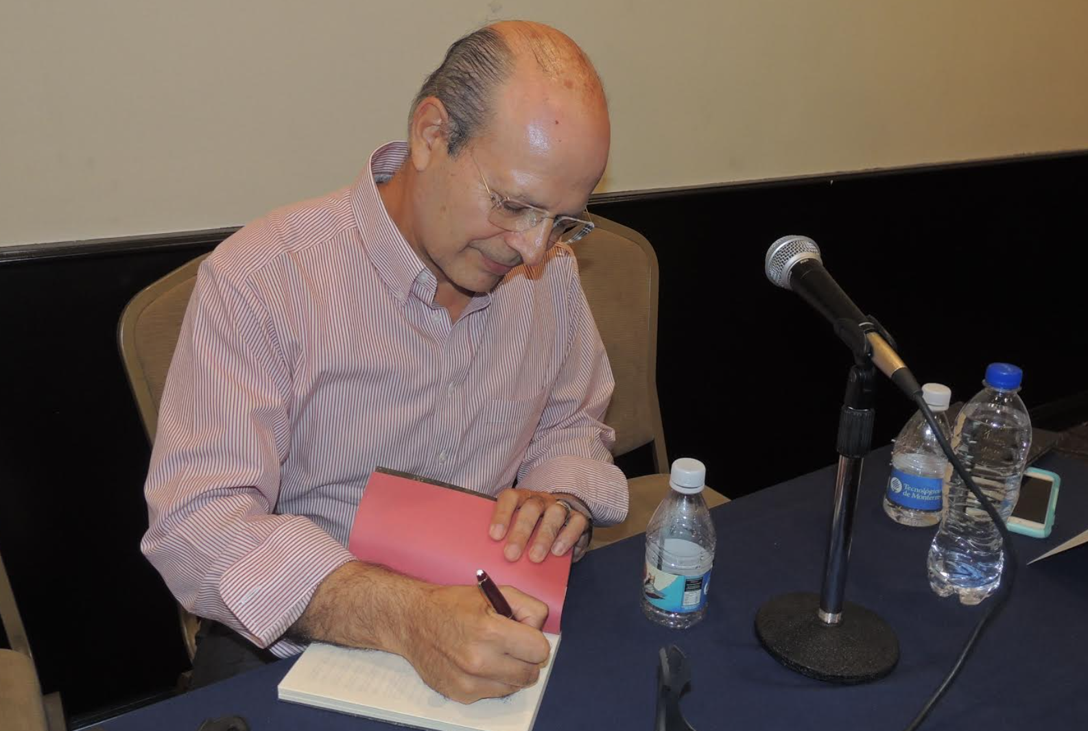 Juan Domingo firmando el libro de un lector en la XXV Feria del Libro.